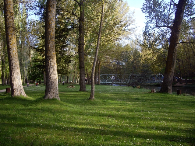 Fotografía tomada con una Pentax Optio A20 en El Sotoplaya el día 14 de mayo de 2012 a las 20h. un día soleado con temperatura agradable. Se observa la pradera y la pasarela que comunica con el Paseo del Postiguillo.